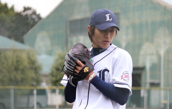 ブルペンでの平野